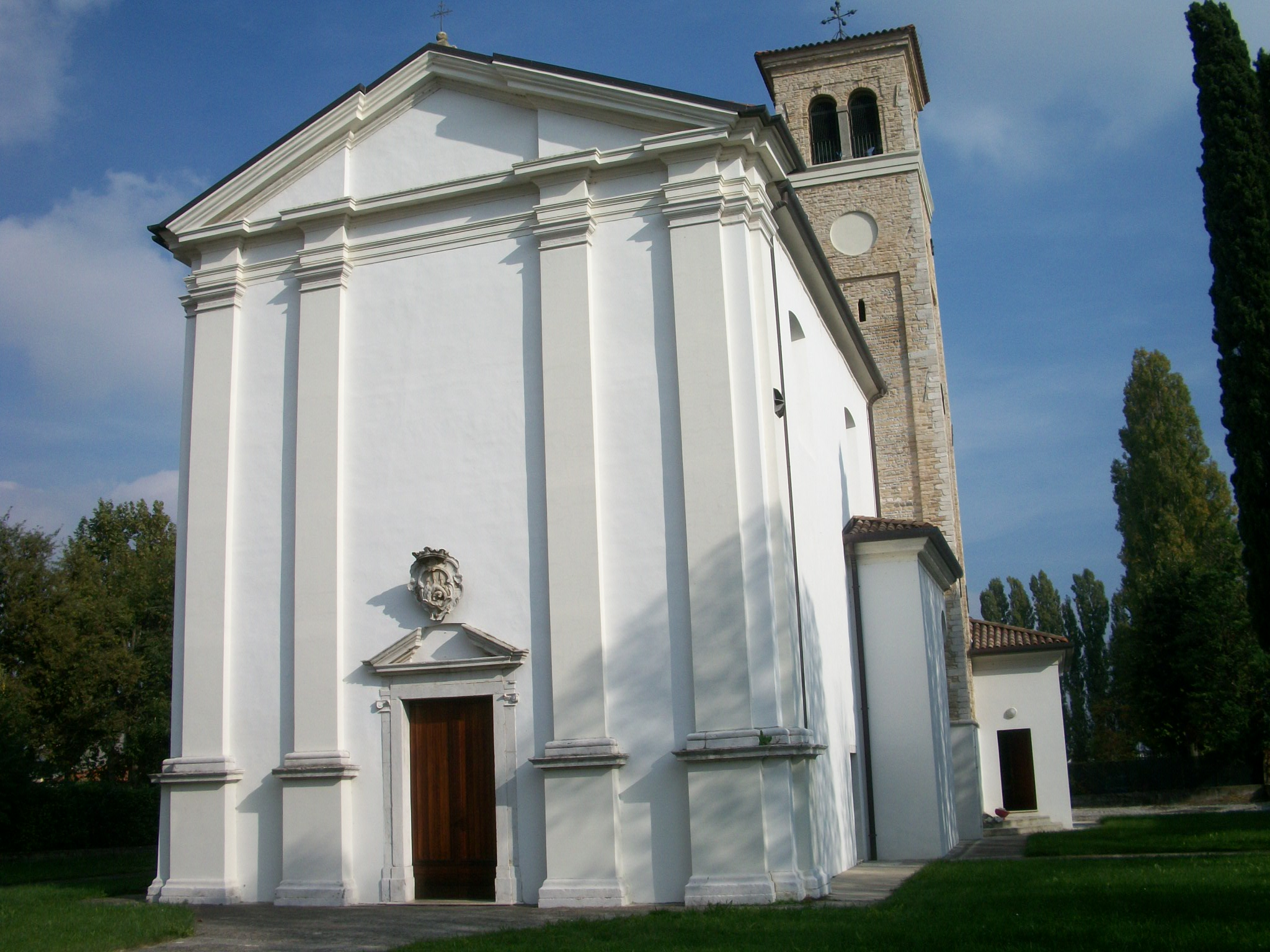 CHIESA PARROCCHIALE IN FRAFOREANO